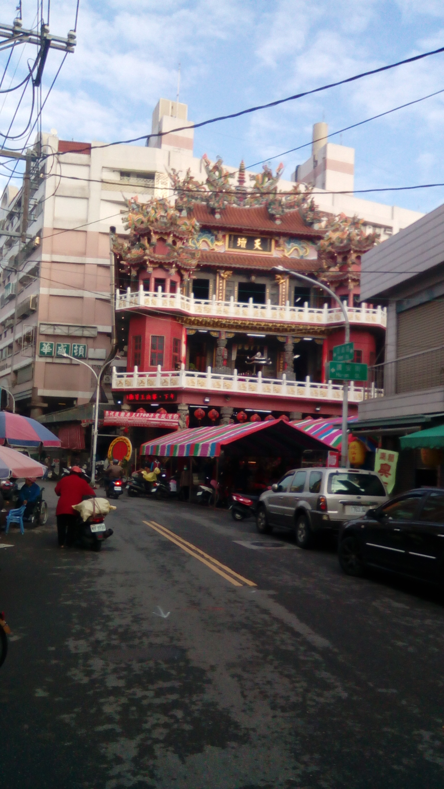 新化區護安街 新化老街內部